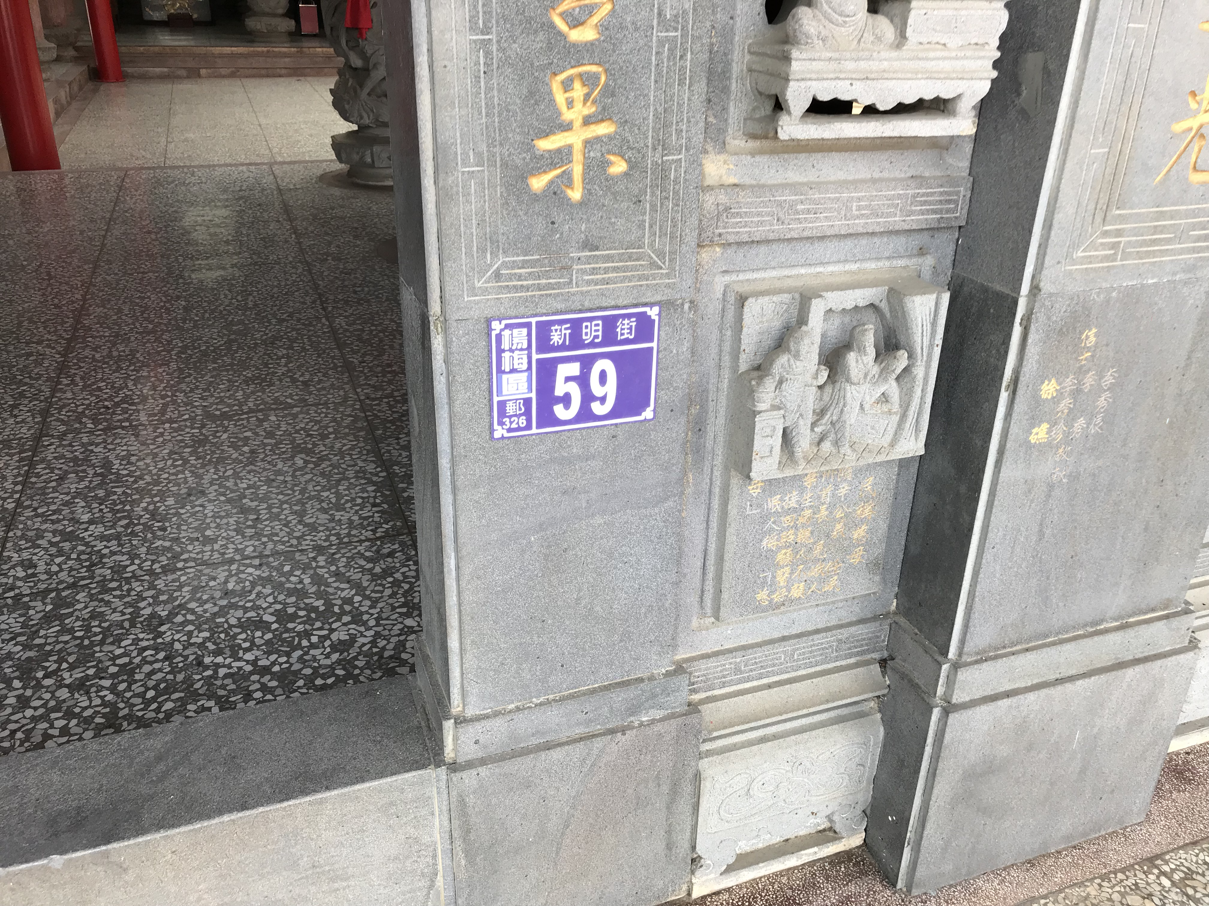 集義祠門牌